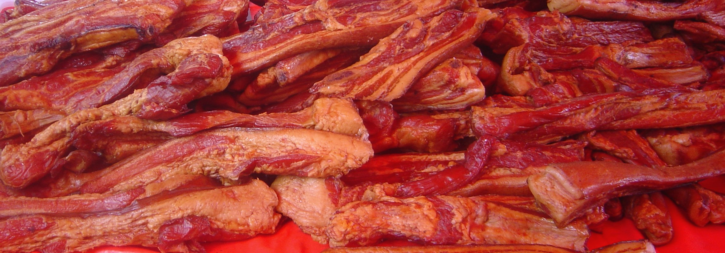 Boucané